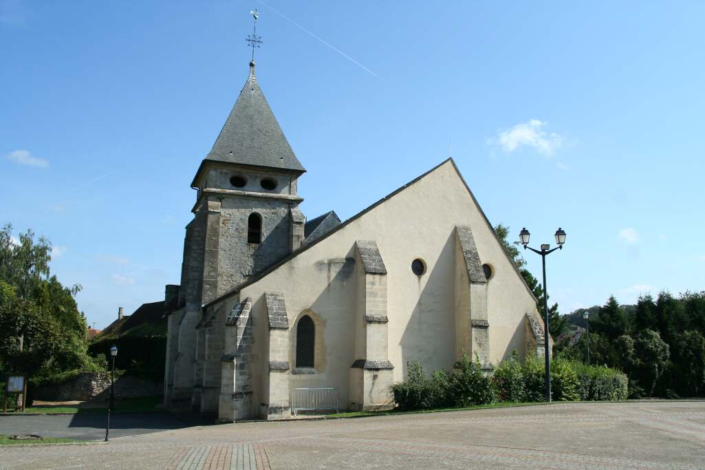 Église de Morainvilliers - Yvelines (France)